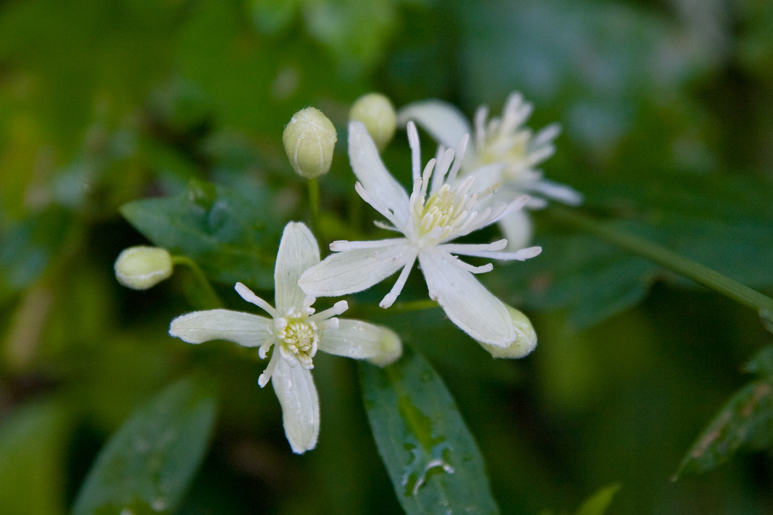 ボタンヅル (学名:Clematis apiifolia)